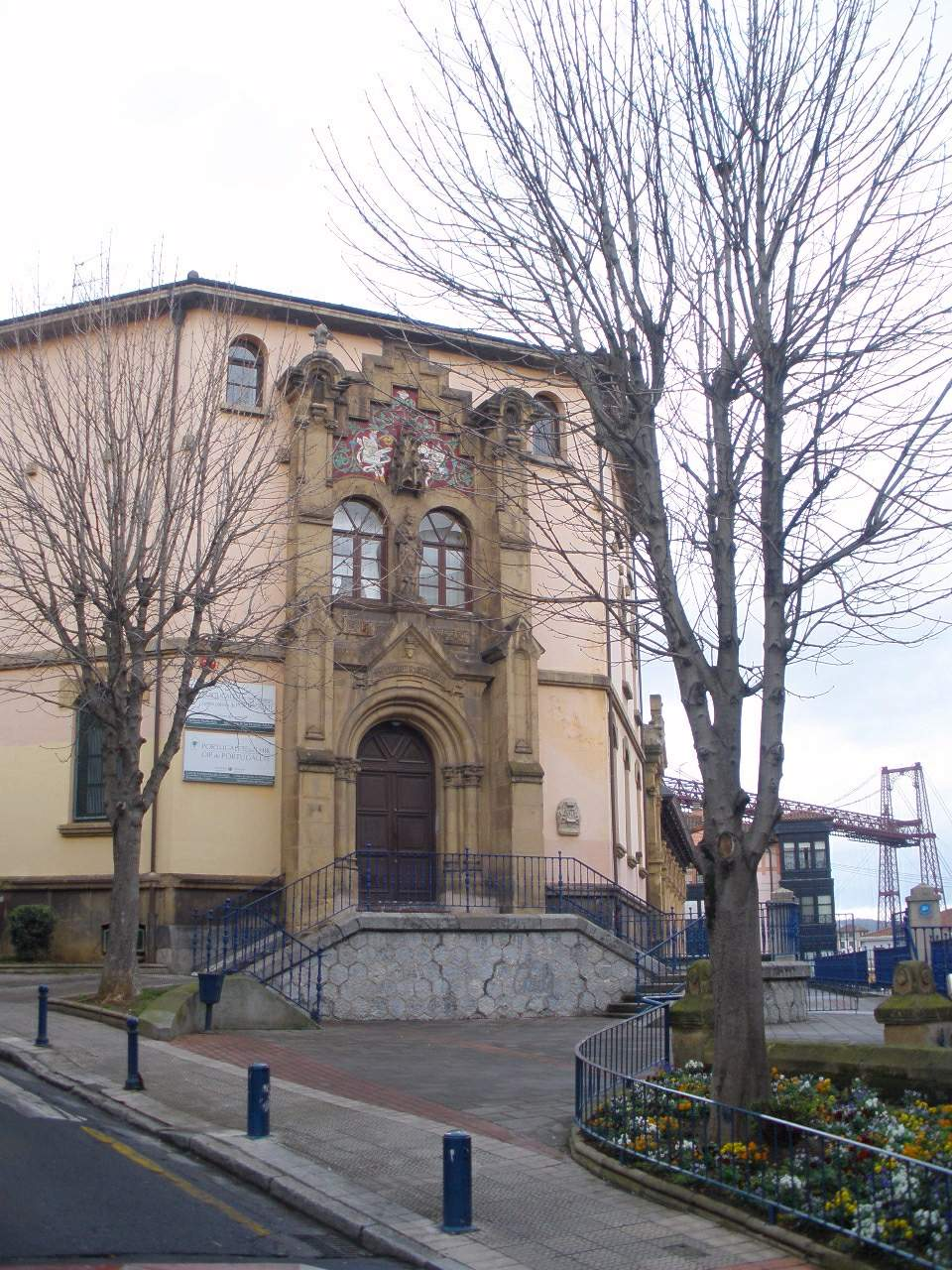 Edificio Ramón Real de Asua - Antiguo Colegio de los Agustinos (Portugalete, Vizcaya)